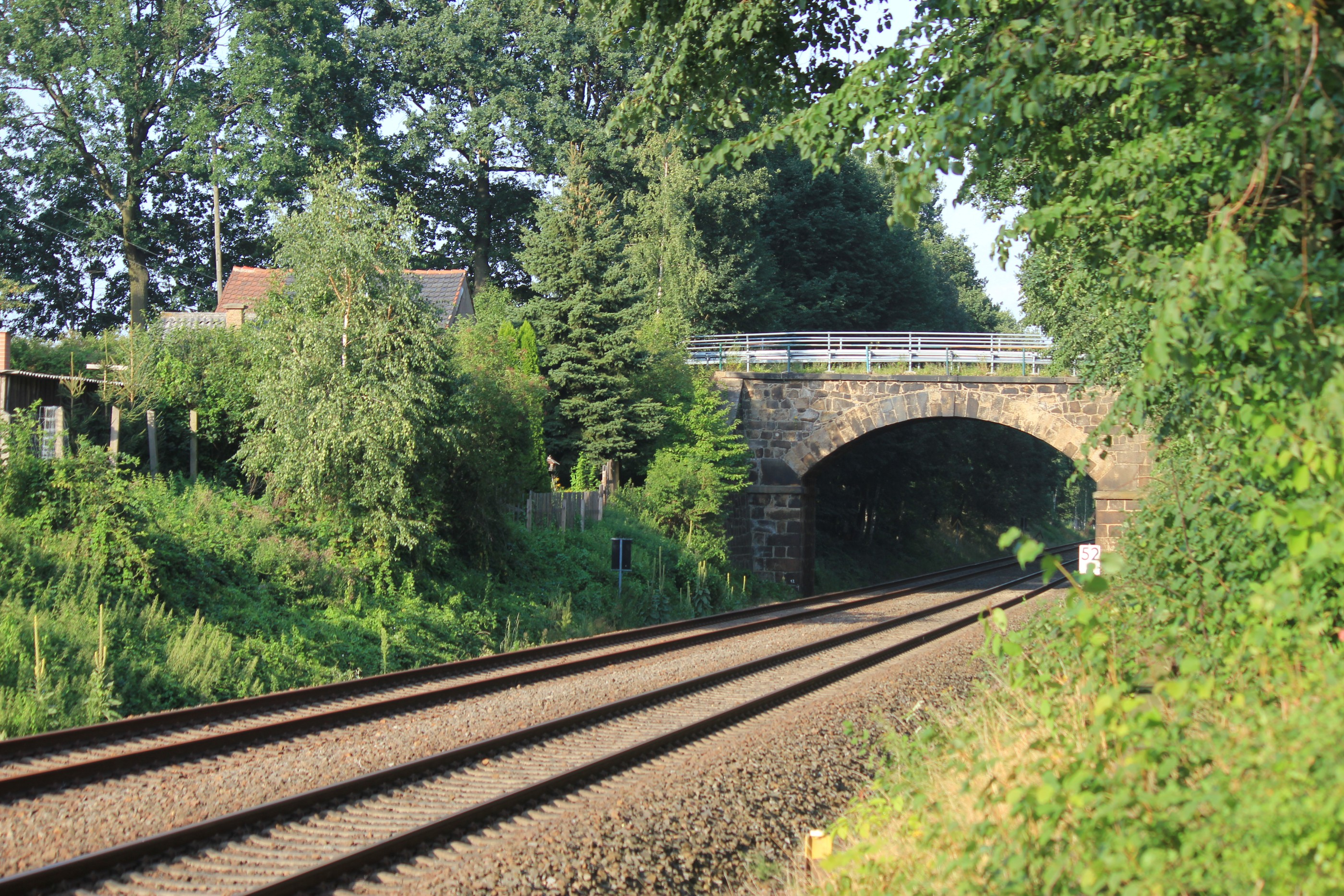 Hornjoserbsce: Móst přez železnisku čaru Drježdźany–Zhorjelc blisko Žičenka.